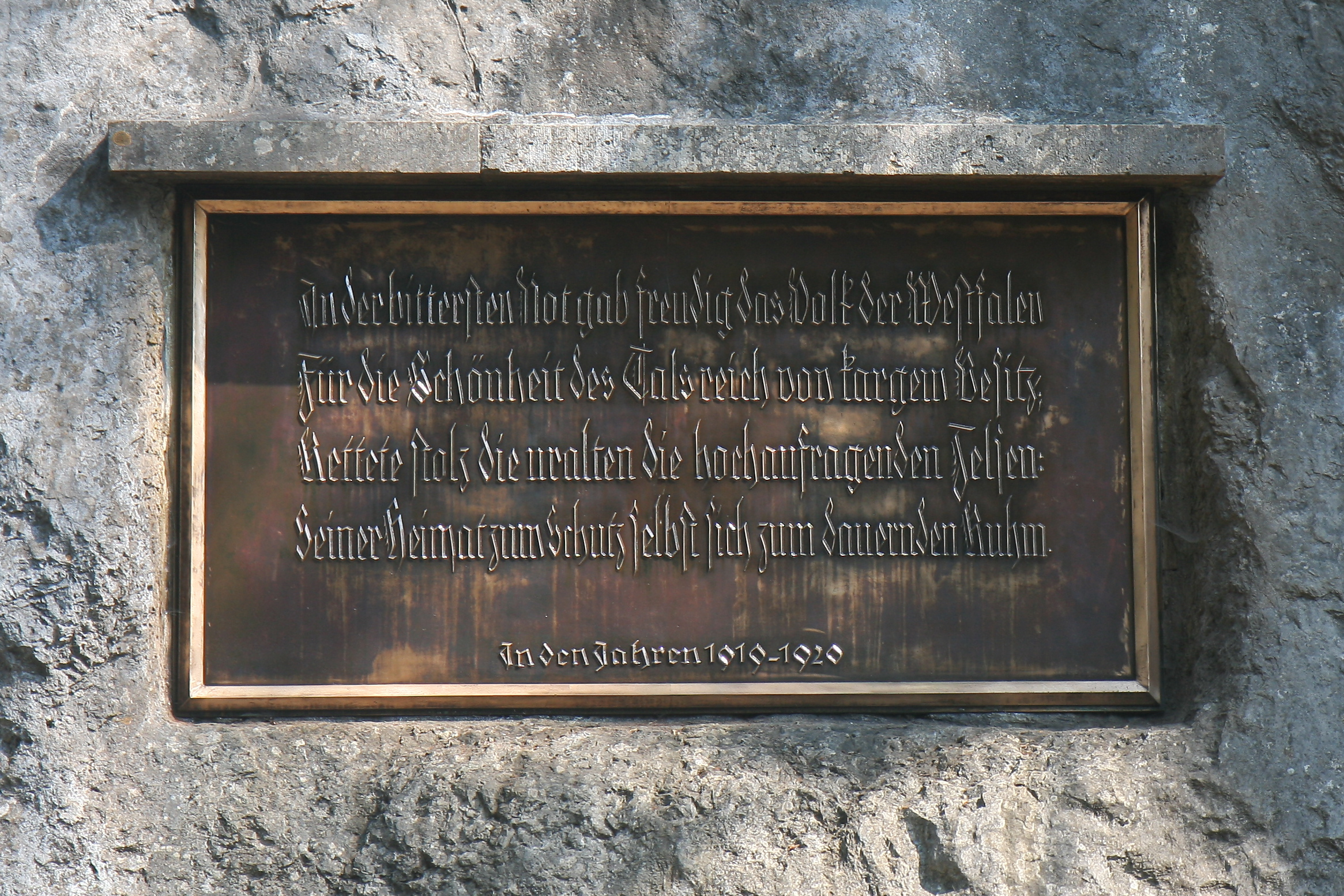 Bronzetafel im Hönnetal nach der Restaurierung im August 2019 in Balve-Eisborn, Klusenstein (B 515).